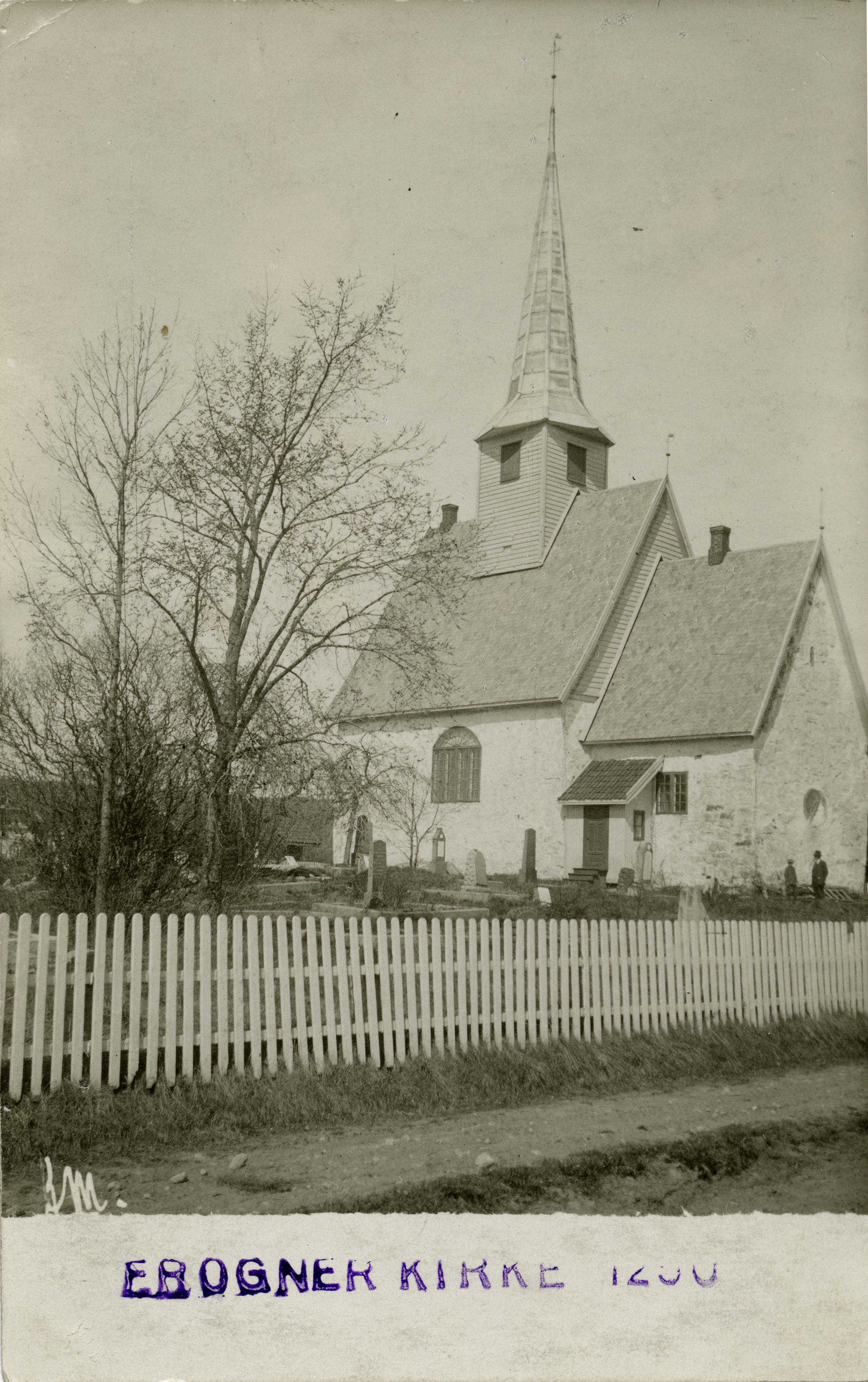 Frogner kirke, gamle i Frogner, Akershus Kirken brant i 1918, gjenoppbygget 1981.